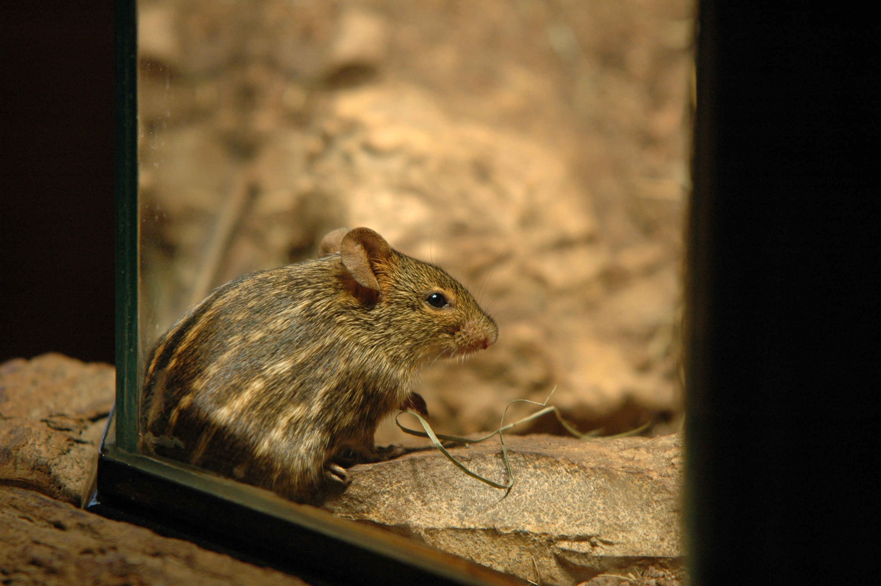 Lemniscomys striatus, Zoo Leipzig